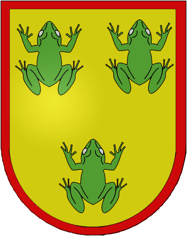 Blason de Clovis